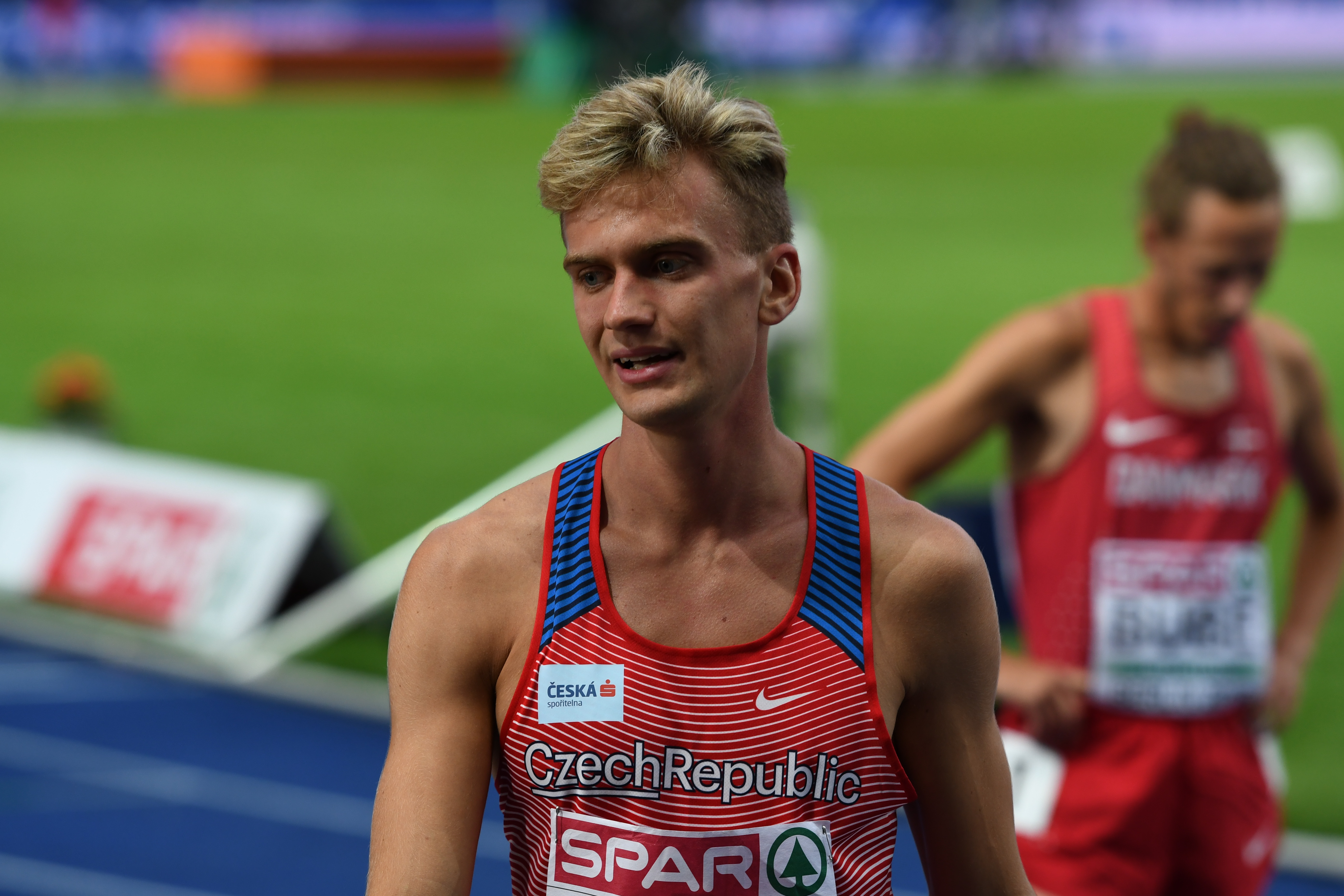 Lukáš Hodboď, finále 800 m ME Berlín